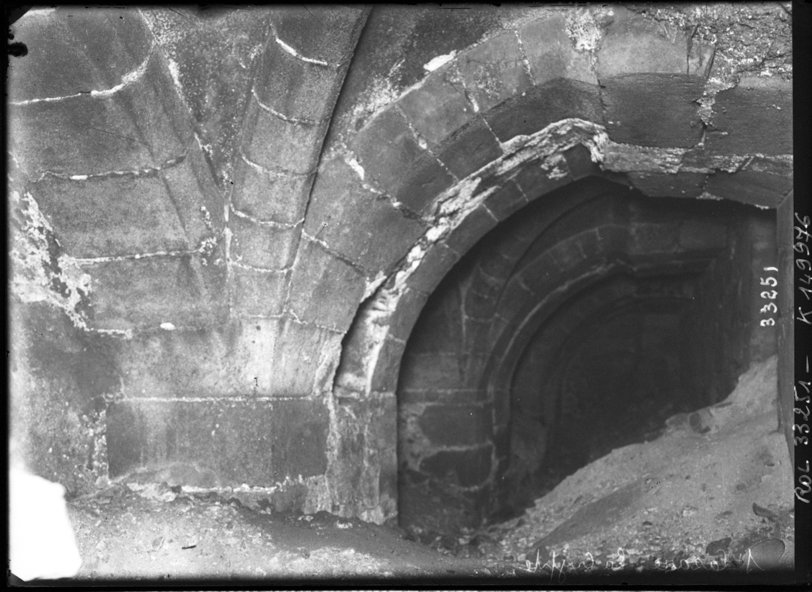 Prison Saint-Lazare, la crypte